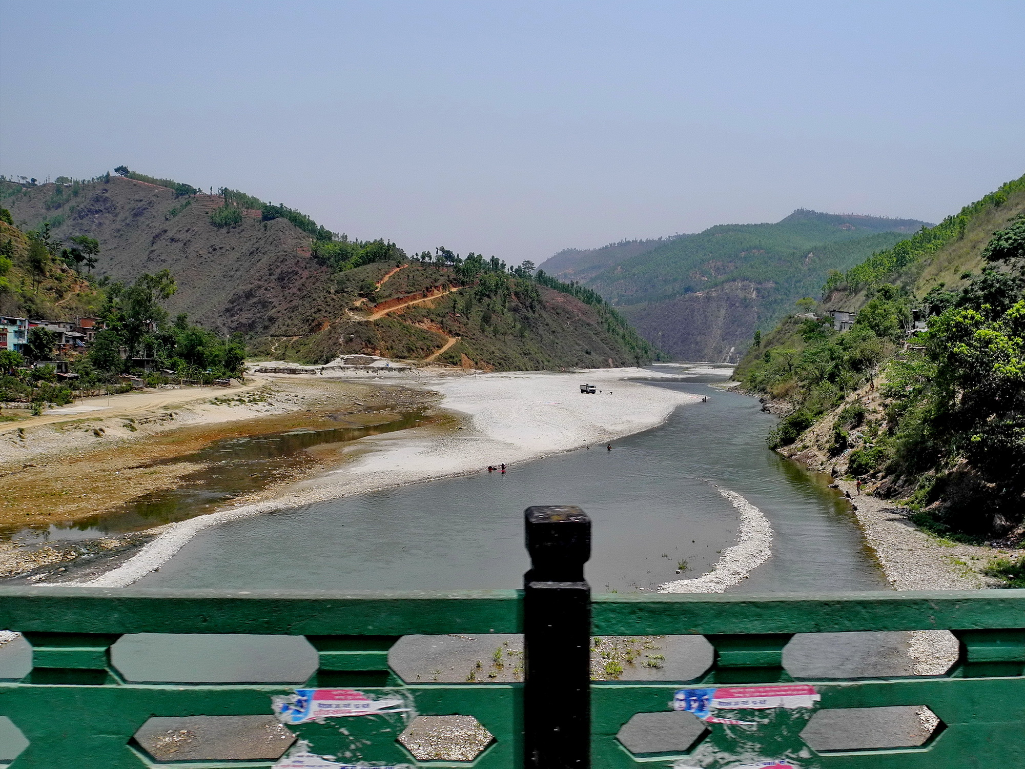 Népal : Araniko Highway : Dolaghbat bridge